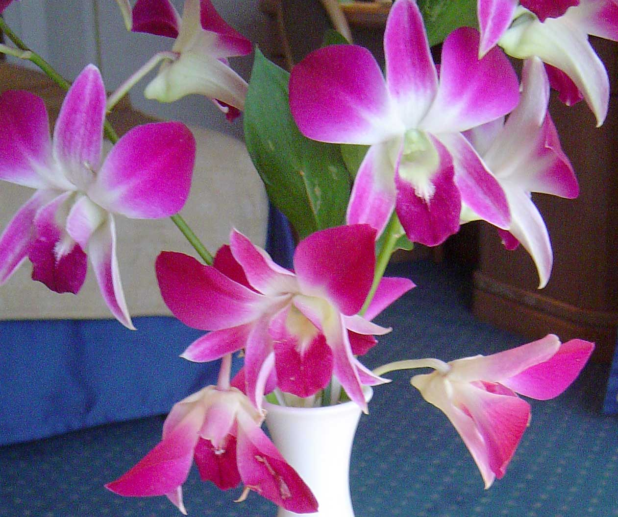 Orchideeën